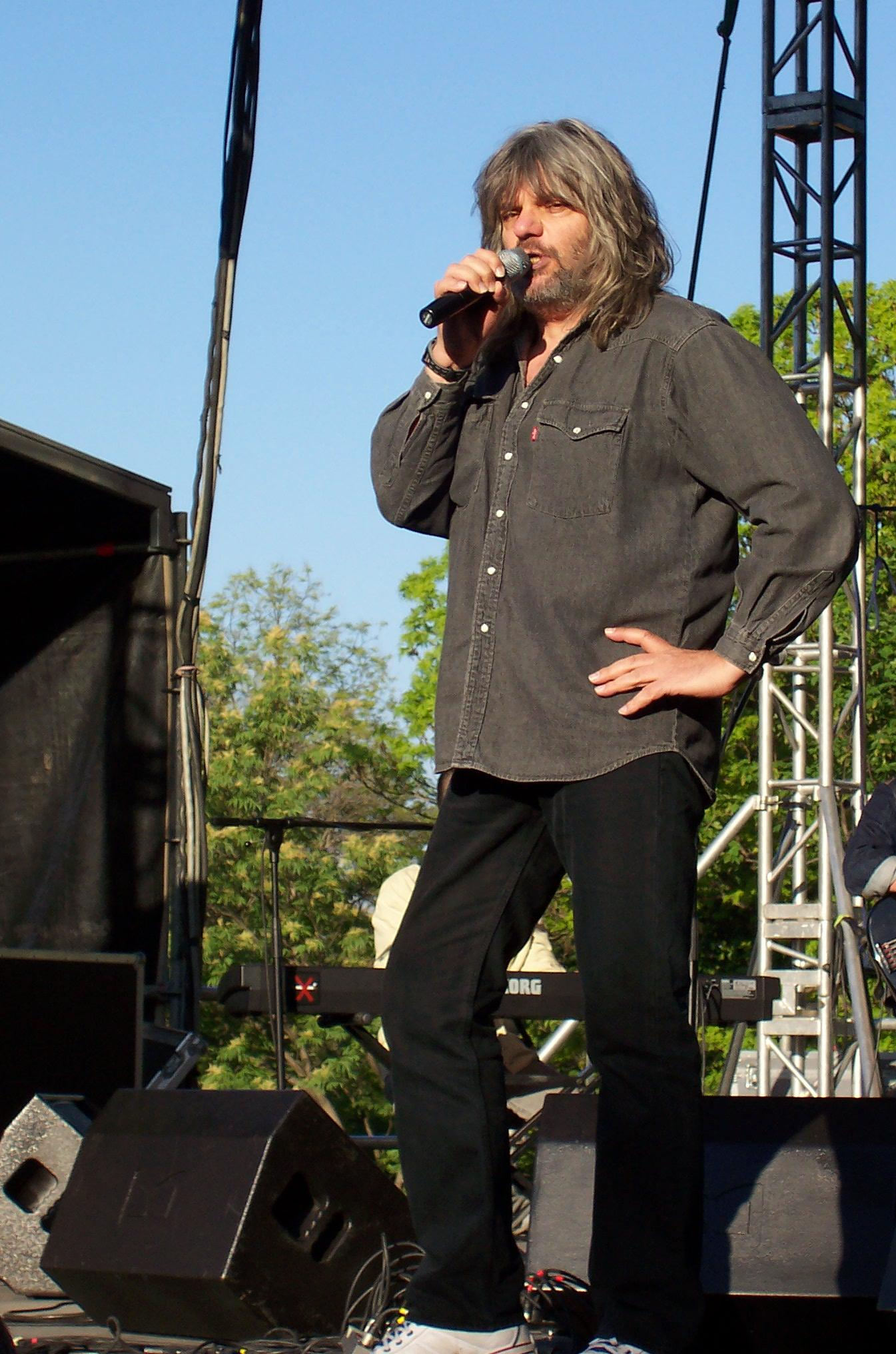 Földes László a Tabánban